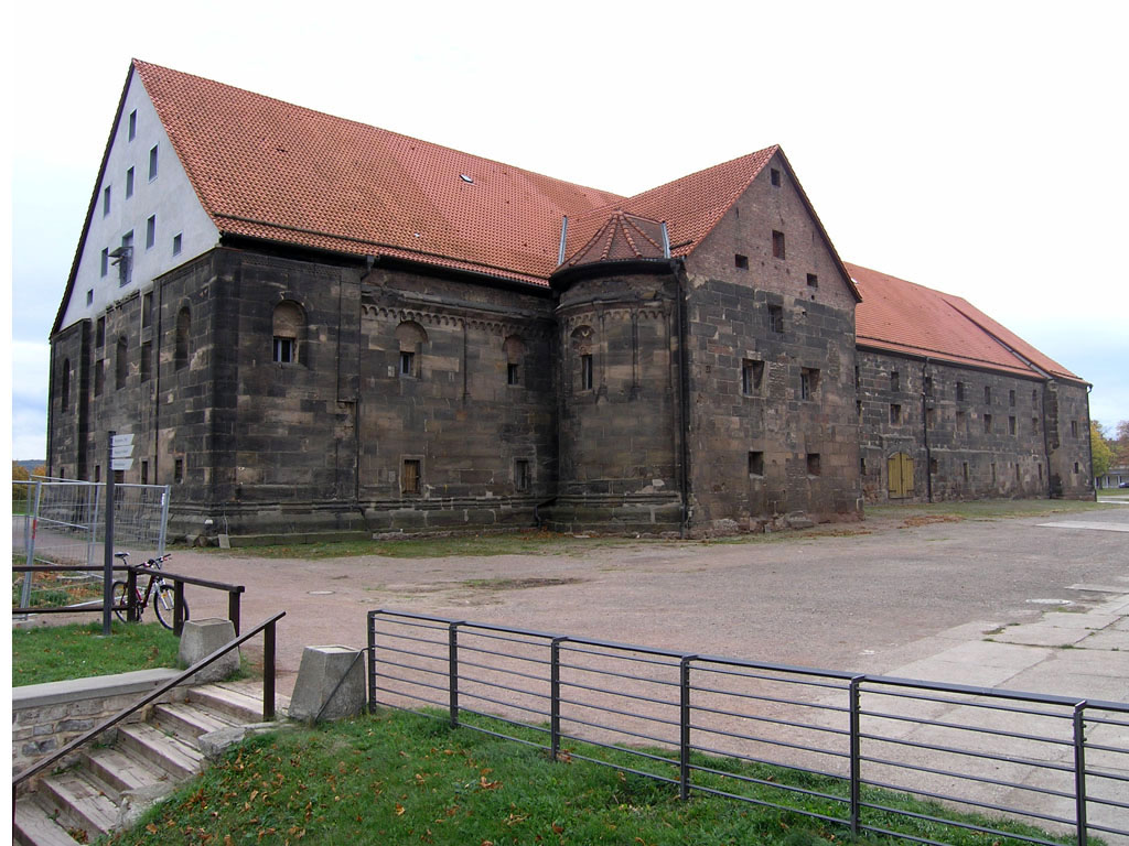 Nordseite der Peterskirche (errichtet zwischen 1103 und 1147) in der Zitadelle Petersberg in Erfurt